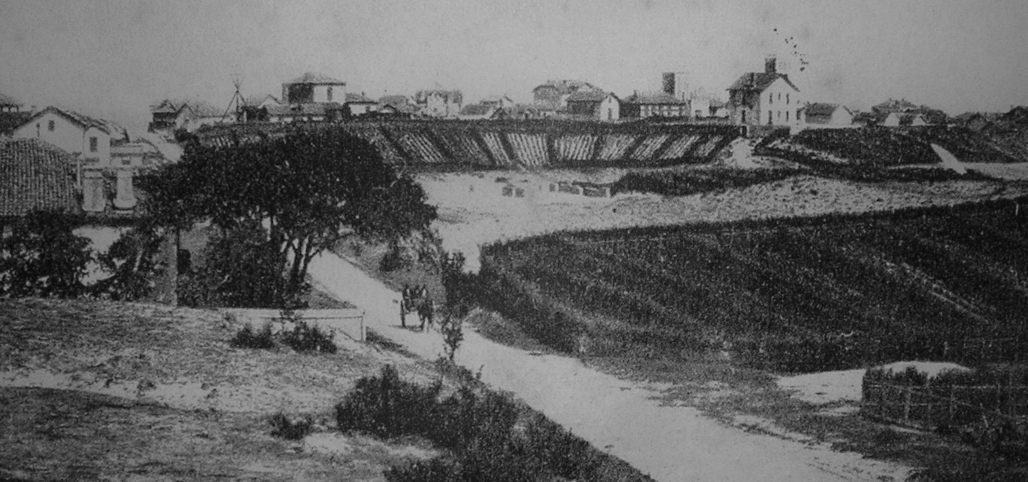 Vue ancienne de Capbreton & du vignoble des sables